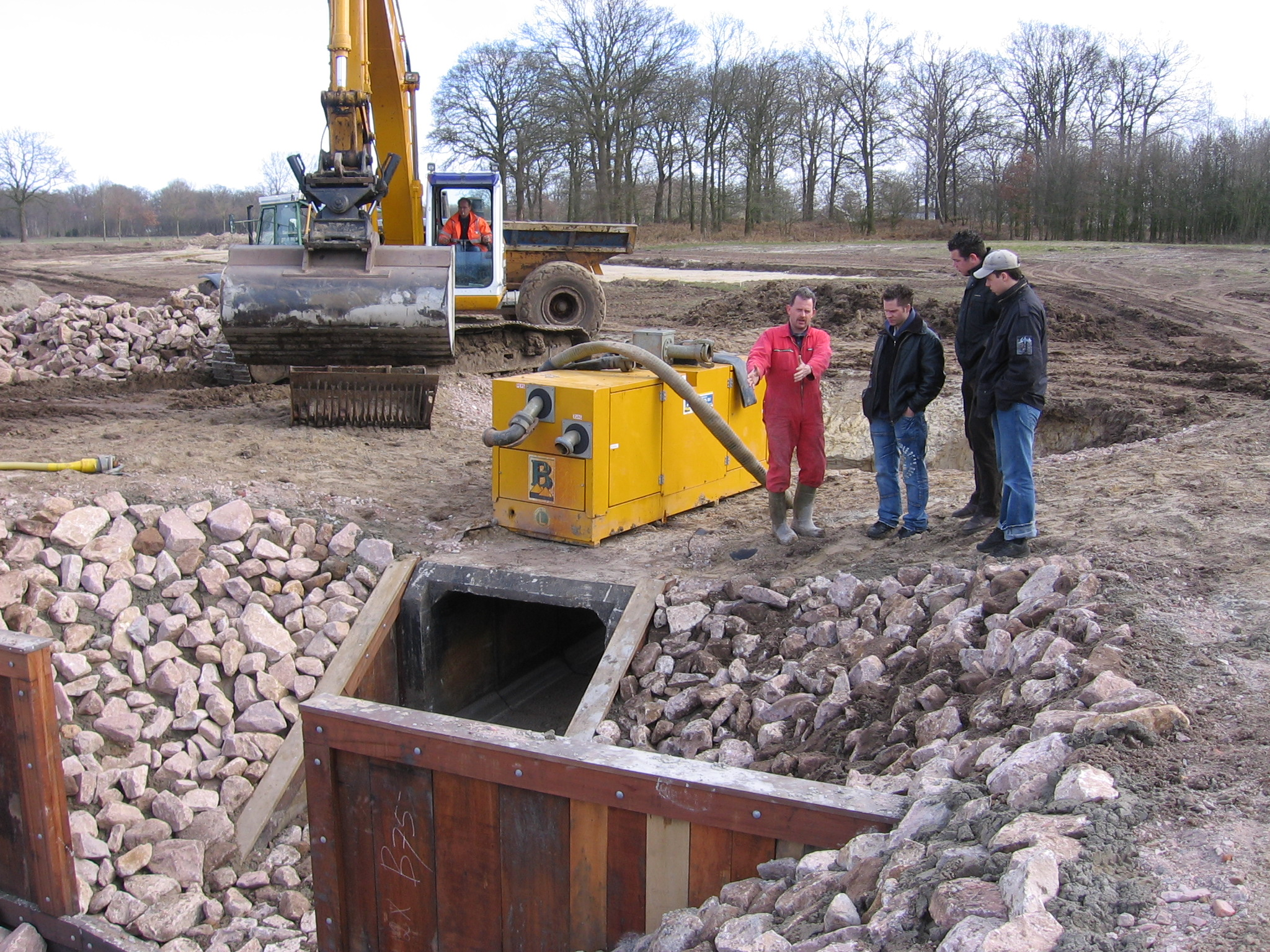 Knijpduiker Spikkersbeek Eigen werk